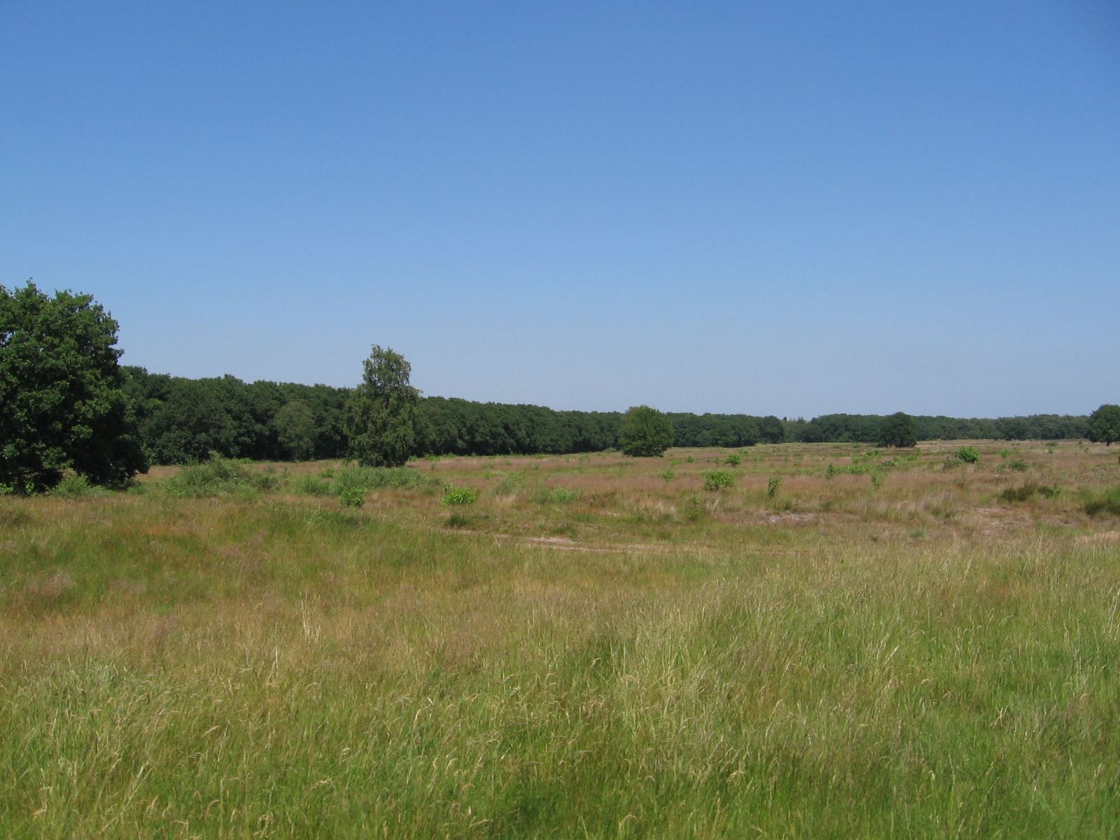 Bussum, Bussumerheide, juni 2006